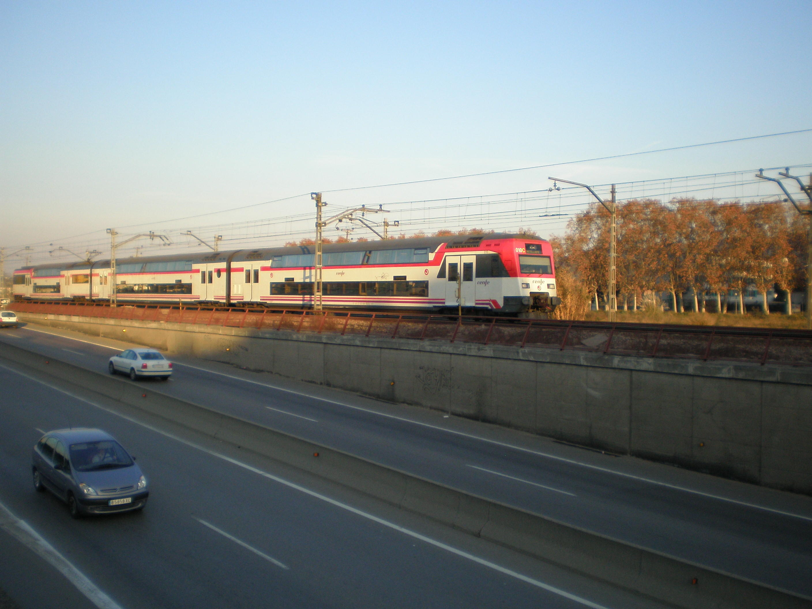 Un automotor eléctrico de la serie 451 de Renfe Operadora acaba de salir de la estación de Mollet - St. Fost en la línea Barcelona - Granollers - Cerbère, junto a la Autovía C-17 (Mollet del Vallès, Vallès Oriental).